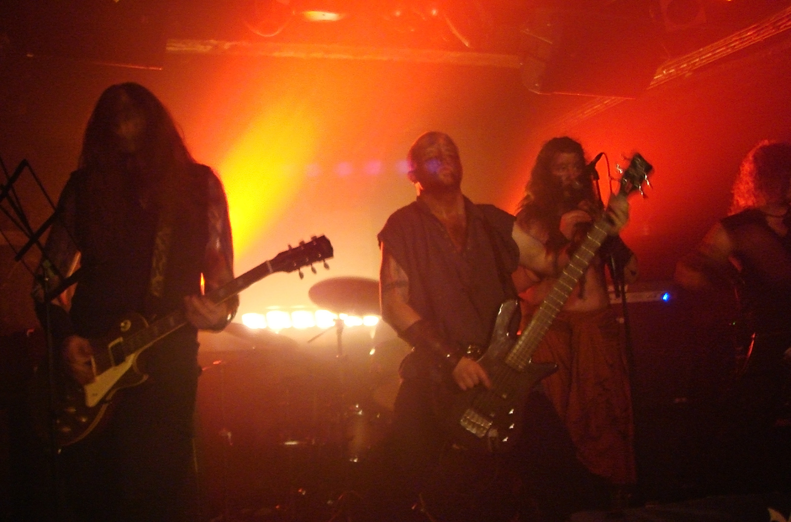 Mael Mórdha en concert au Cernunnos Pagan Fest 2008, organisé par les Acteurs de l'Ombre à la Locomotive, à Paris, le 20 Décembre 2008.